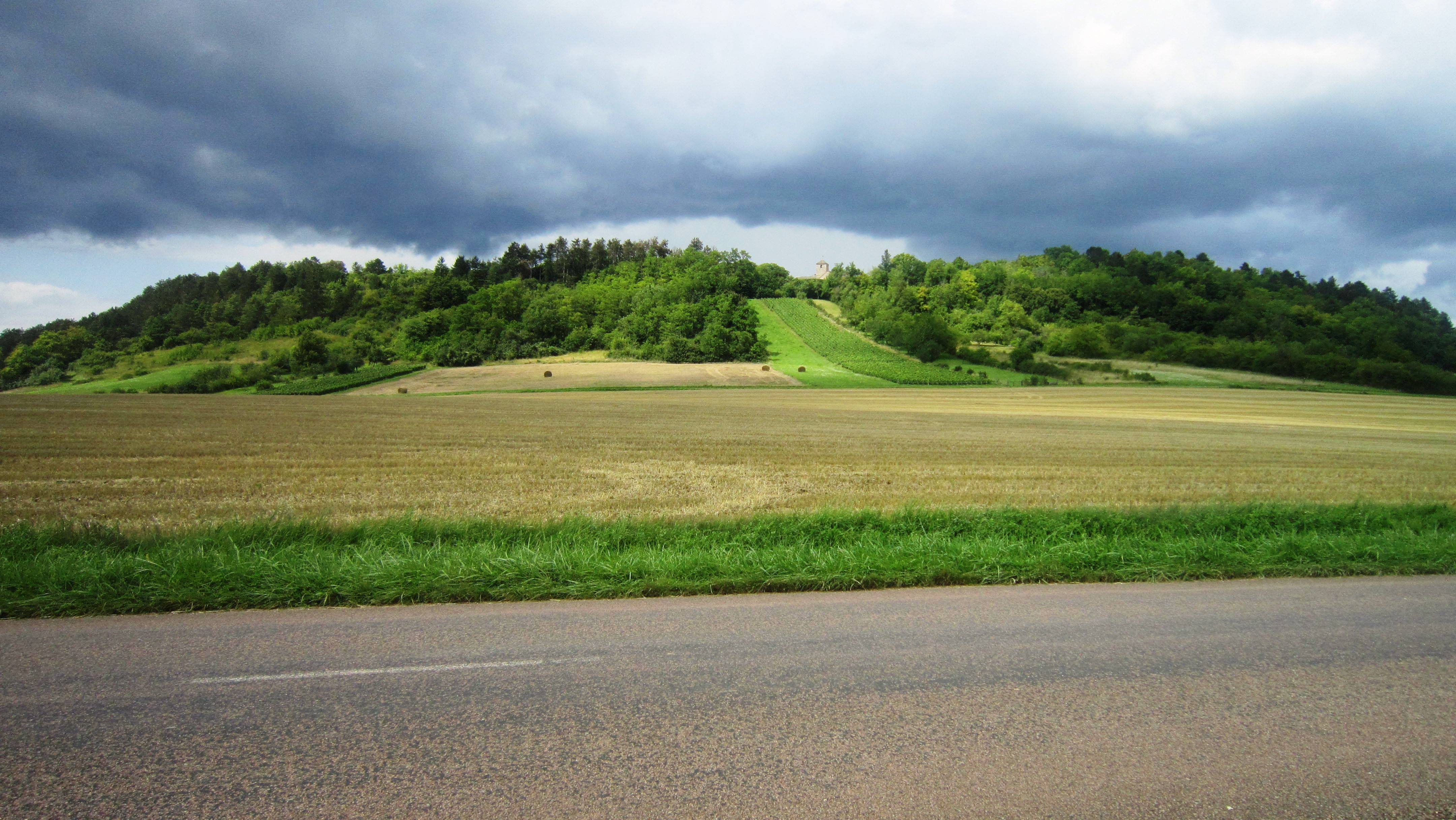 Vue du Mont Lassois en nord Côte-d'Or (France)